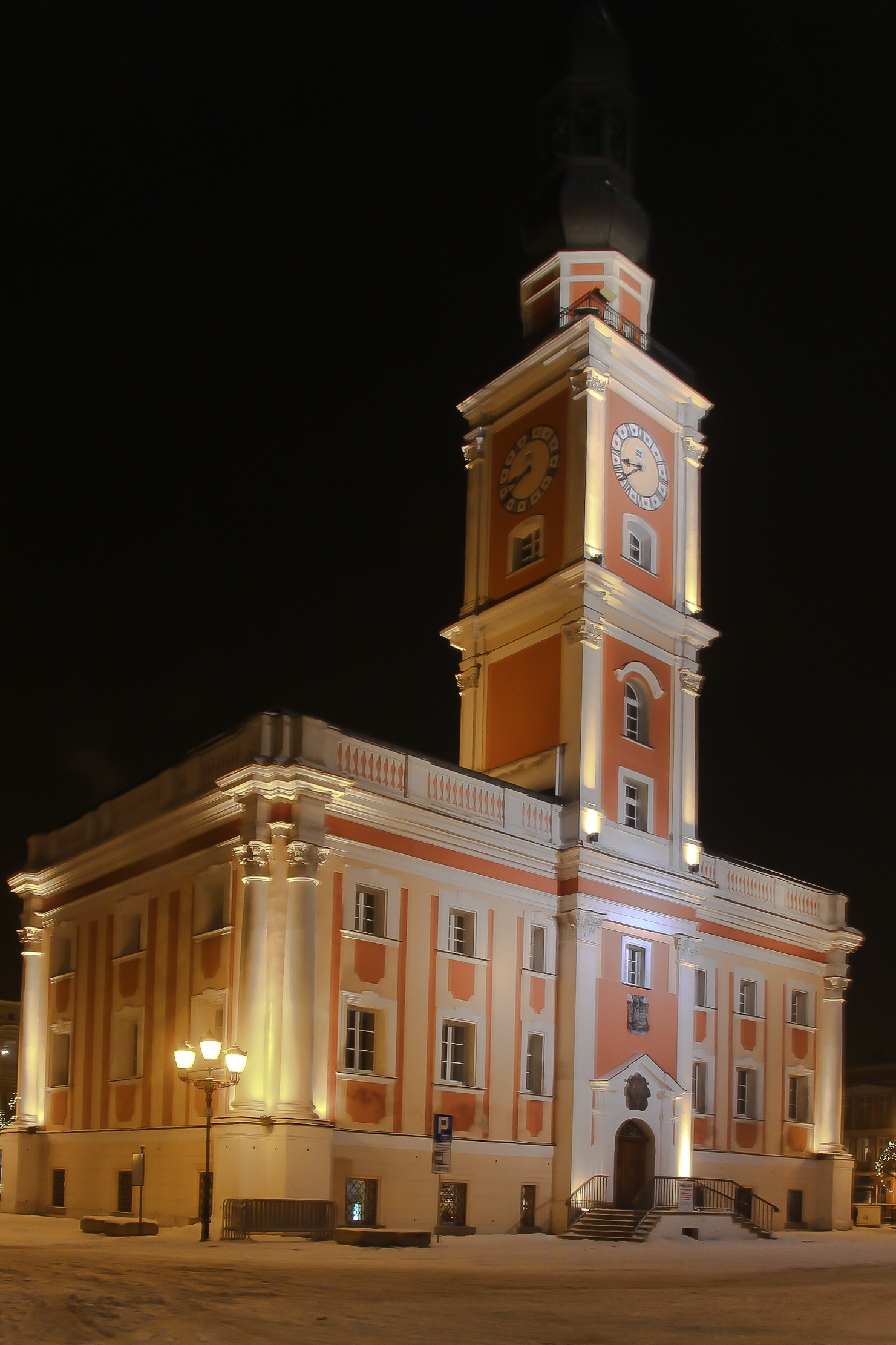 Barokowa ratusz z 1707–1708 albo 1709 w Lesznie, Wojewodztwo Wielkopolskie, Polska.